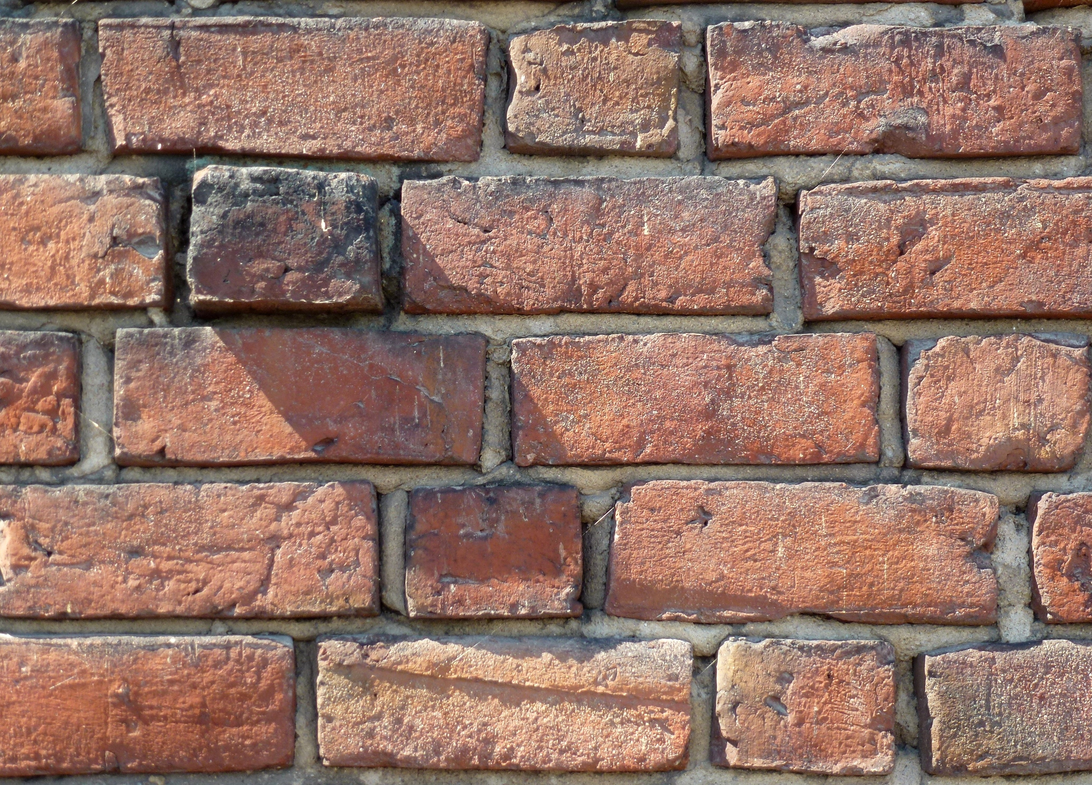 Stockholms stadshus tegelmurning, tornets östra sida